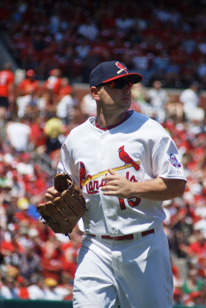 Matt Holliday